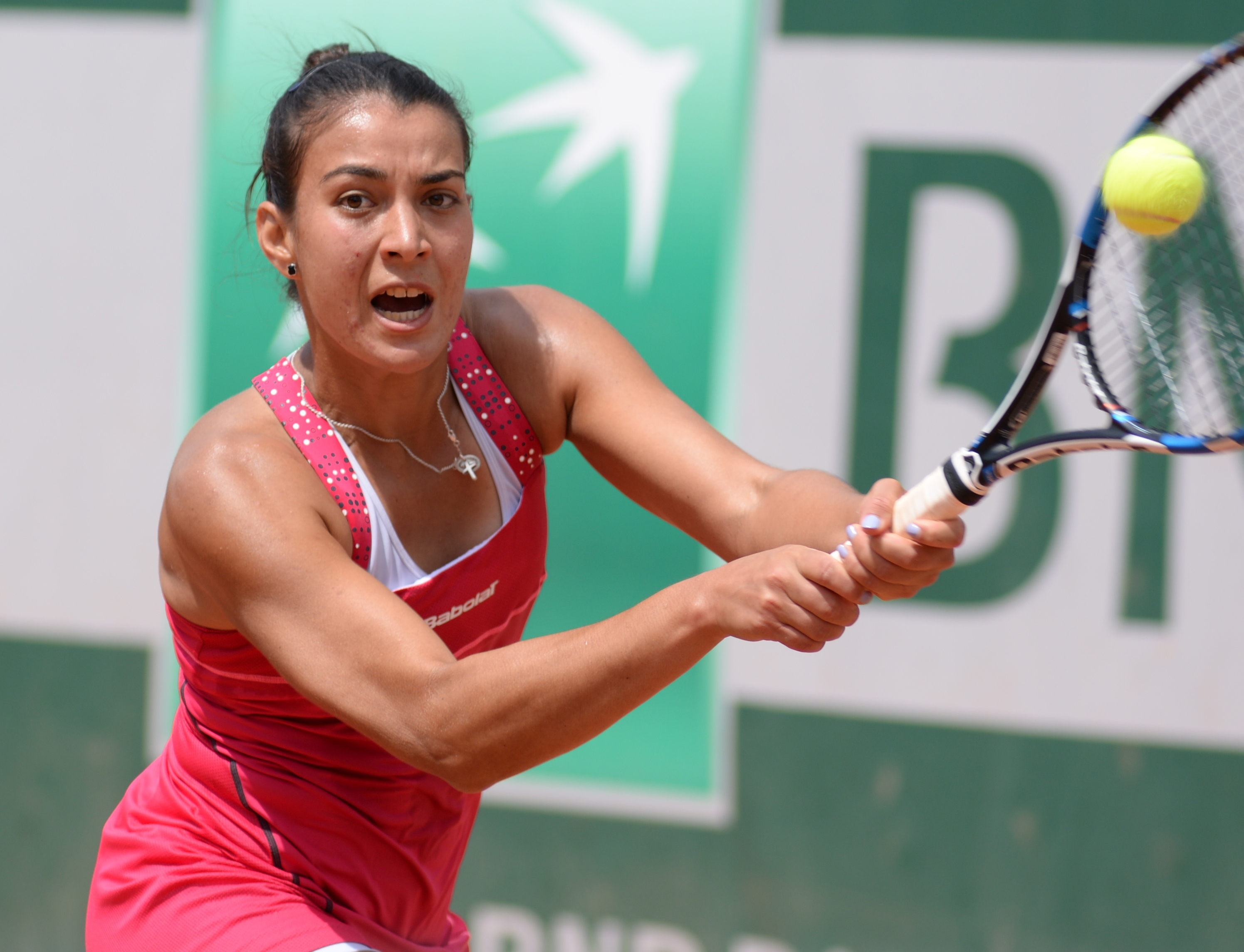 Veronica Cepede Royg